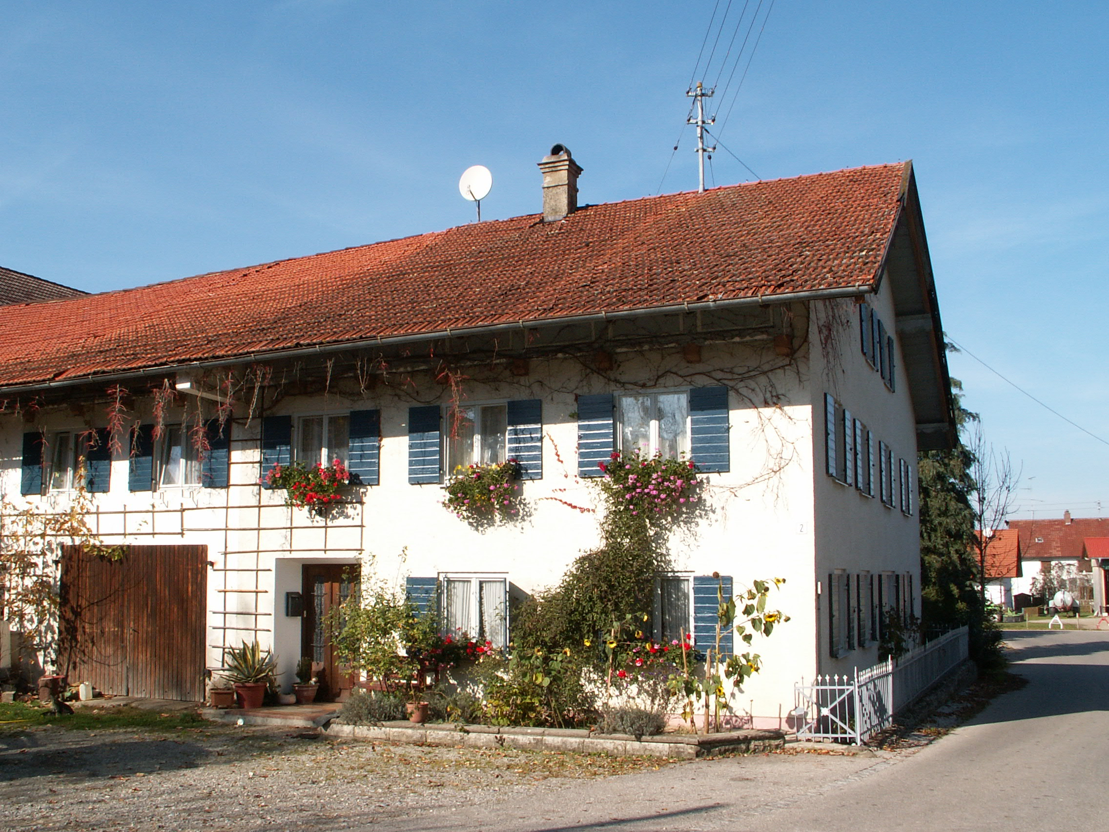 Pfarrer-Klein-Str. 2 in Stöttwang